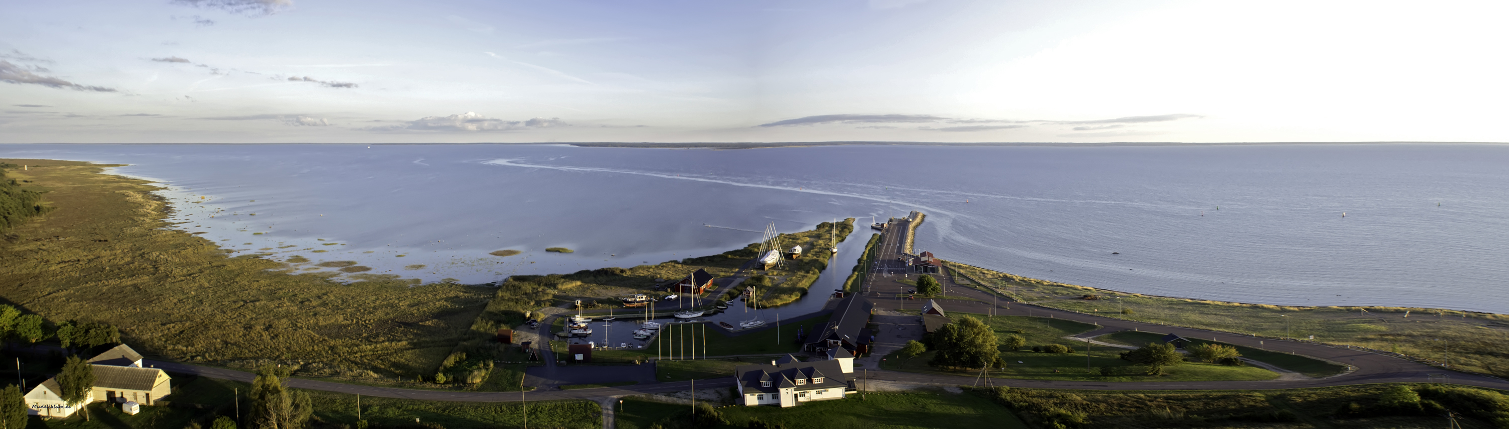 Sõru sadama panoraam